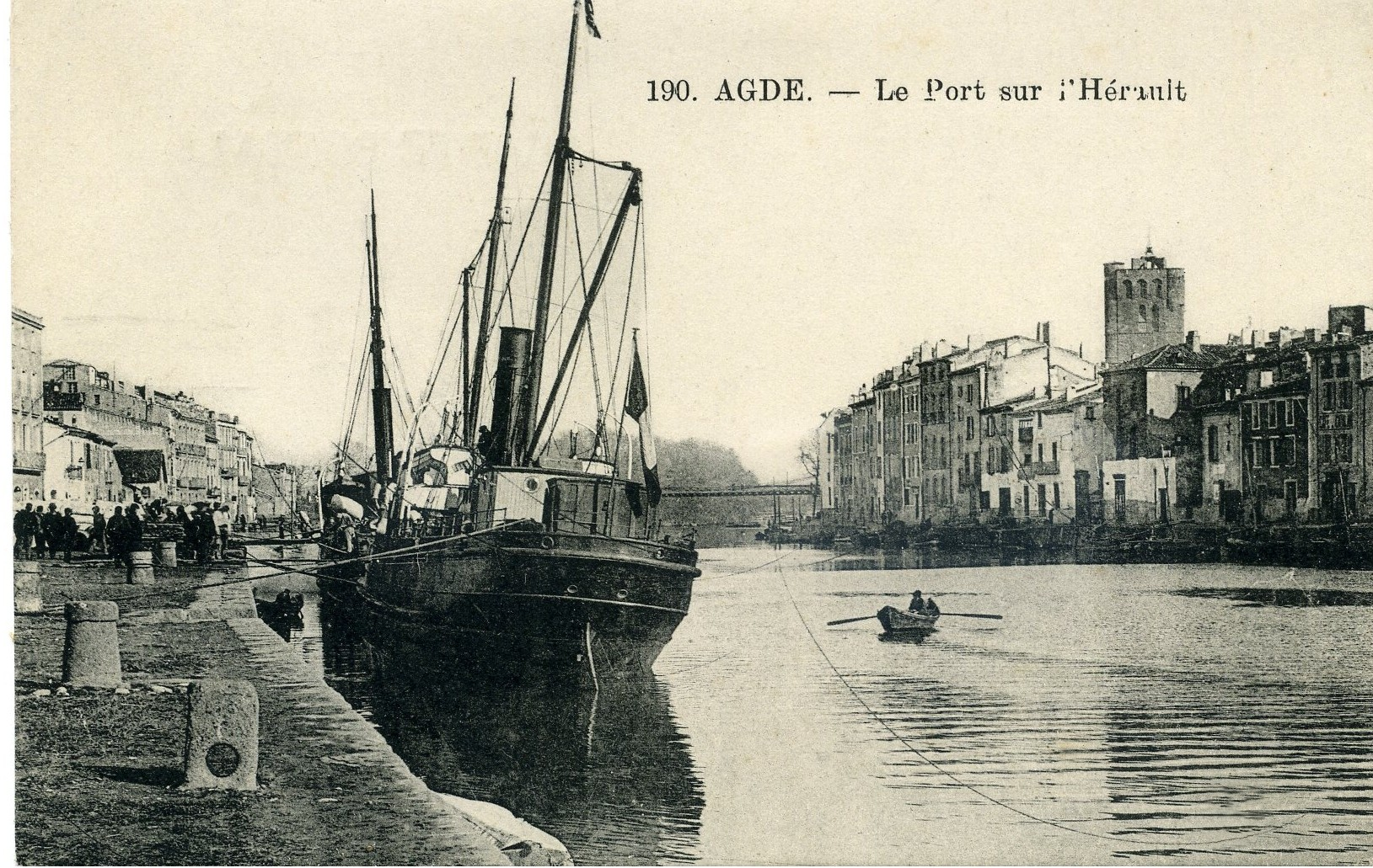 Le port d'Agde (Hérault - France) au début du XXe siècle